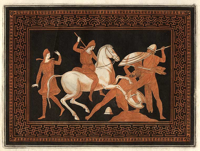 Abrollung einer Abbildung einer attisch-rotfigurigen Vase in Collection Of Etruscan, Greek And Roman Antiquities From The Cabinet Of The Honble. Wm. Hamilton von Pierre-François Hugues d’Hancarville aus der Sammlung William Hamilton